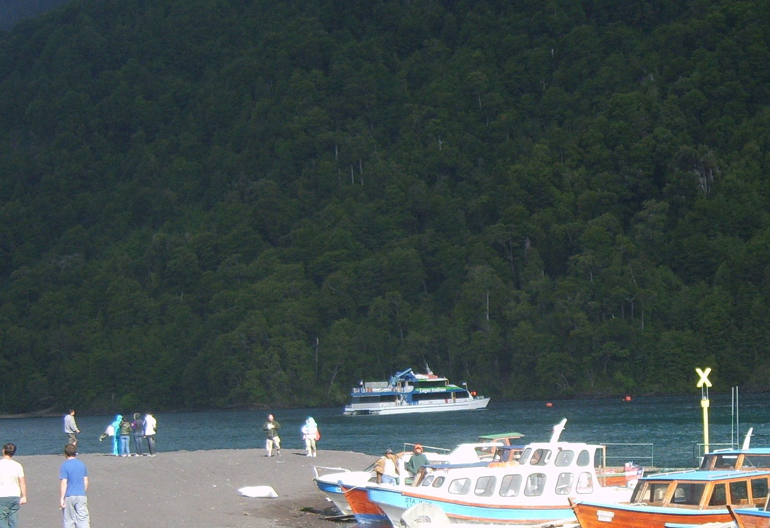 Petohue, en el Lago todos Los Santos